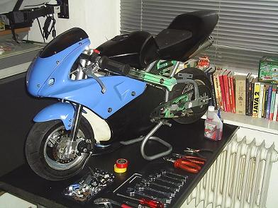 Pocket Bike. Foto selbst aufgenommen Panasonic3DCenter 17:13, 15. Aug 2005 (CEST)